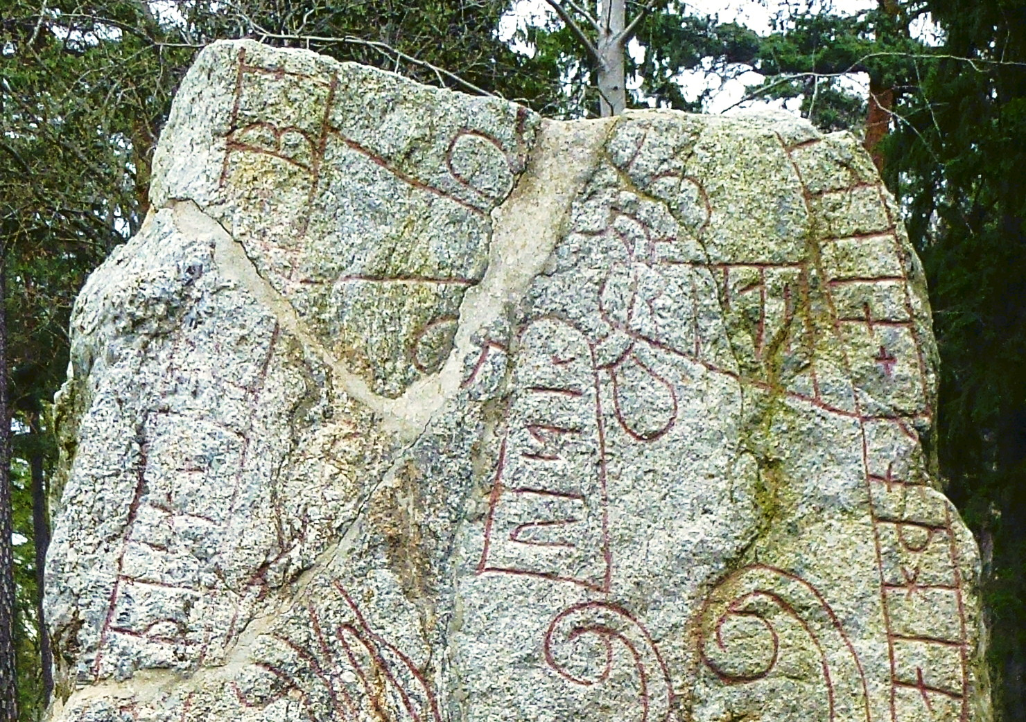 Detalj av Runstenen U 74 i Akalla/Husby.